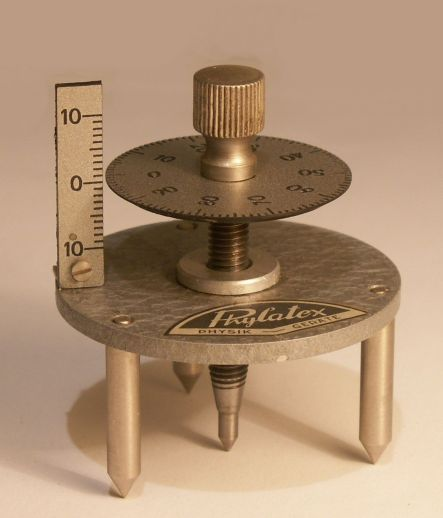 Eigen opname spherometer, Phylatex Physik Geräte